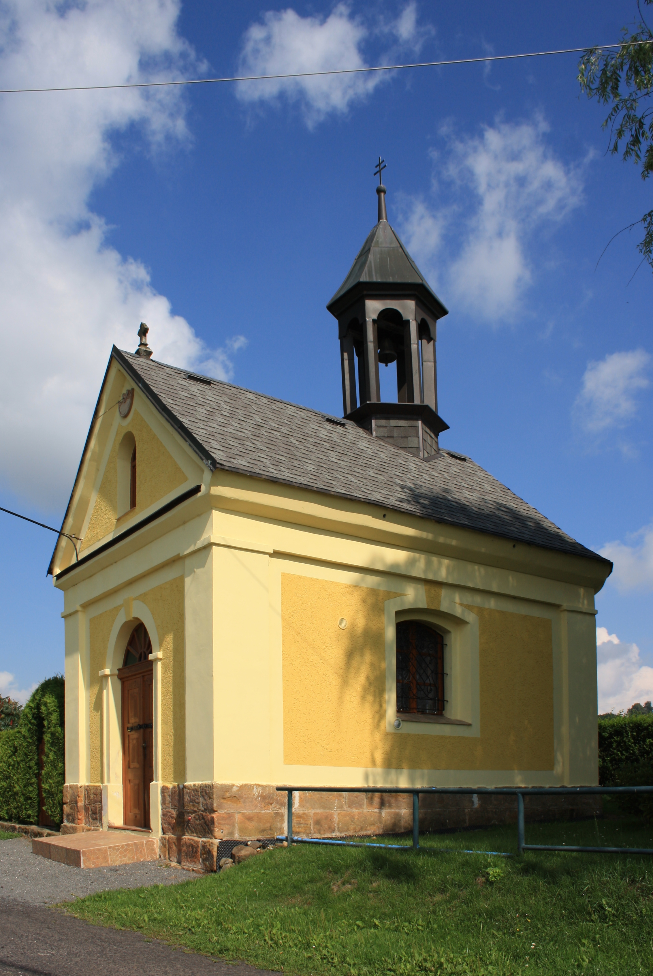 Česky: Hamr na Jezeře, Útěchovice